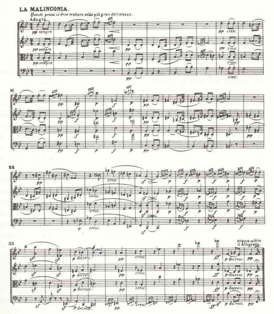 Strijkkw 6 Beethoven 4e deel La Malinconia